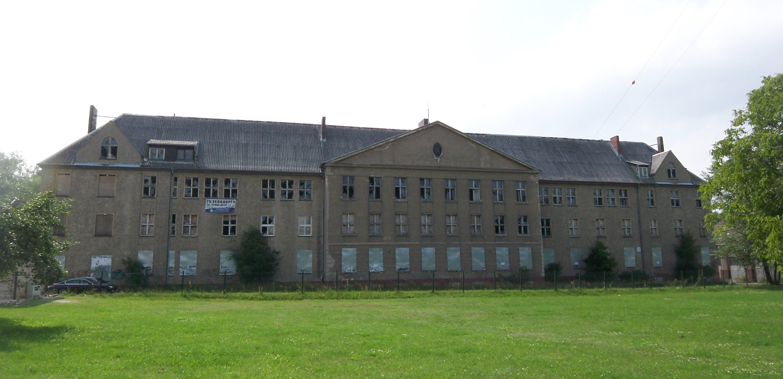 Königs Wusterhausen, Funkerberg. Ehem. Mannschaftsgebäude vor der Sanierung, 2012.